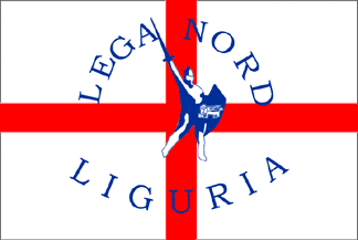 Lliga Nord de Ligúria